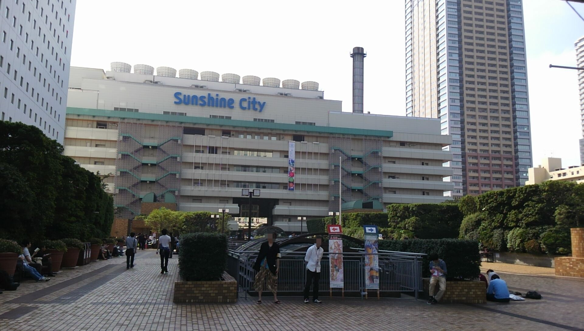 サンシャインクリエイション60の開催場所となった、池袋サンシャインシティ。SC60開催前（2013-06-23 08:41:26/JST）に入口付近にて撮影。